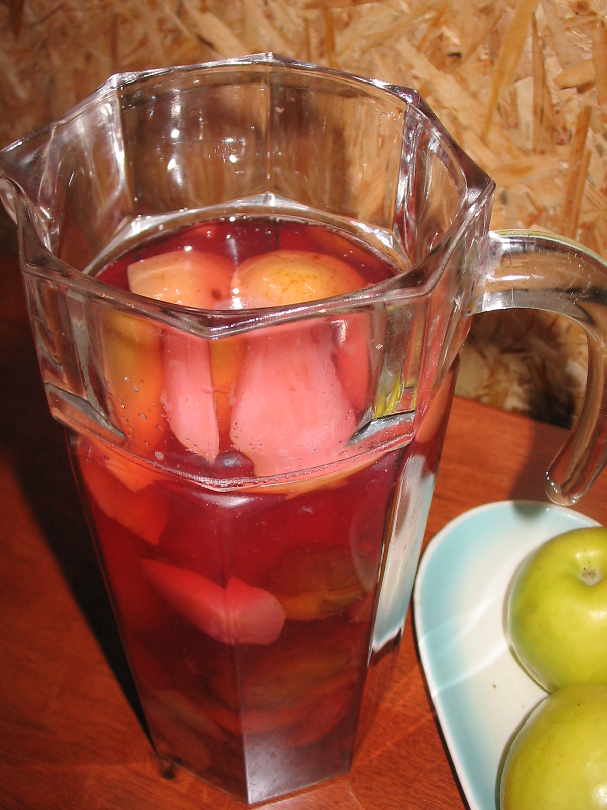 кулінарія: компот з фруктів